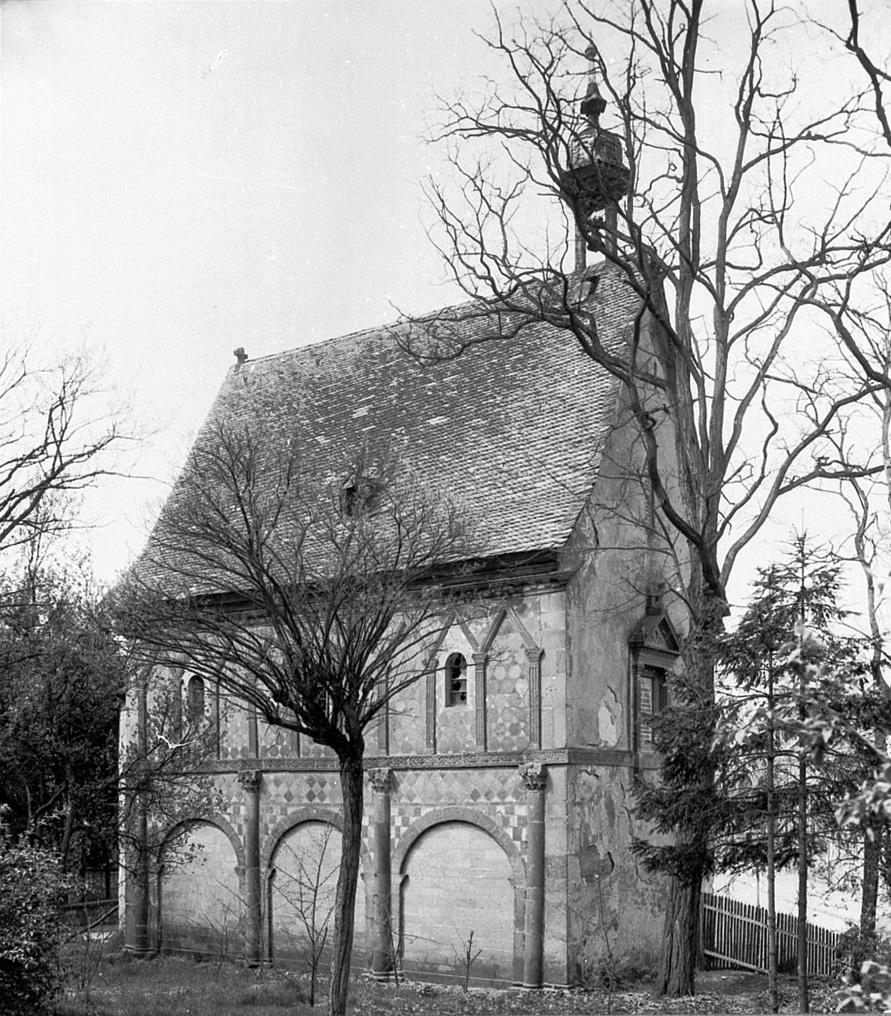 Die Ostseite der Torhalle des Kloster Lorsch im Jahr 1900 vor der Restaurierung